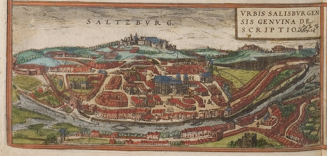 Salzburg